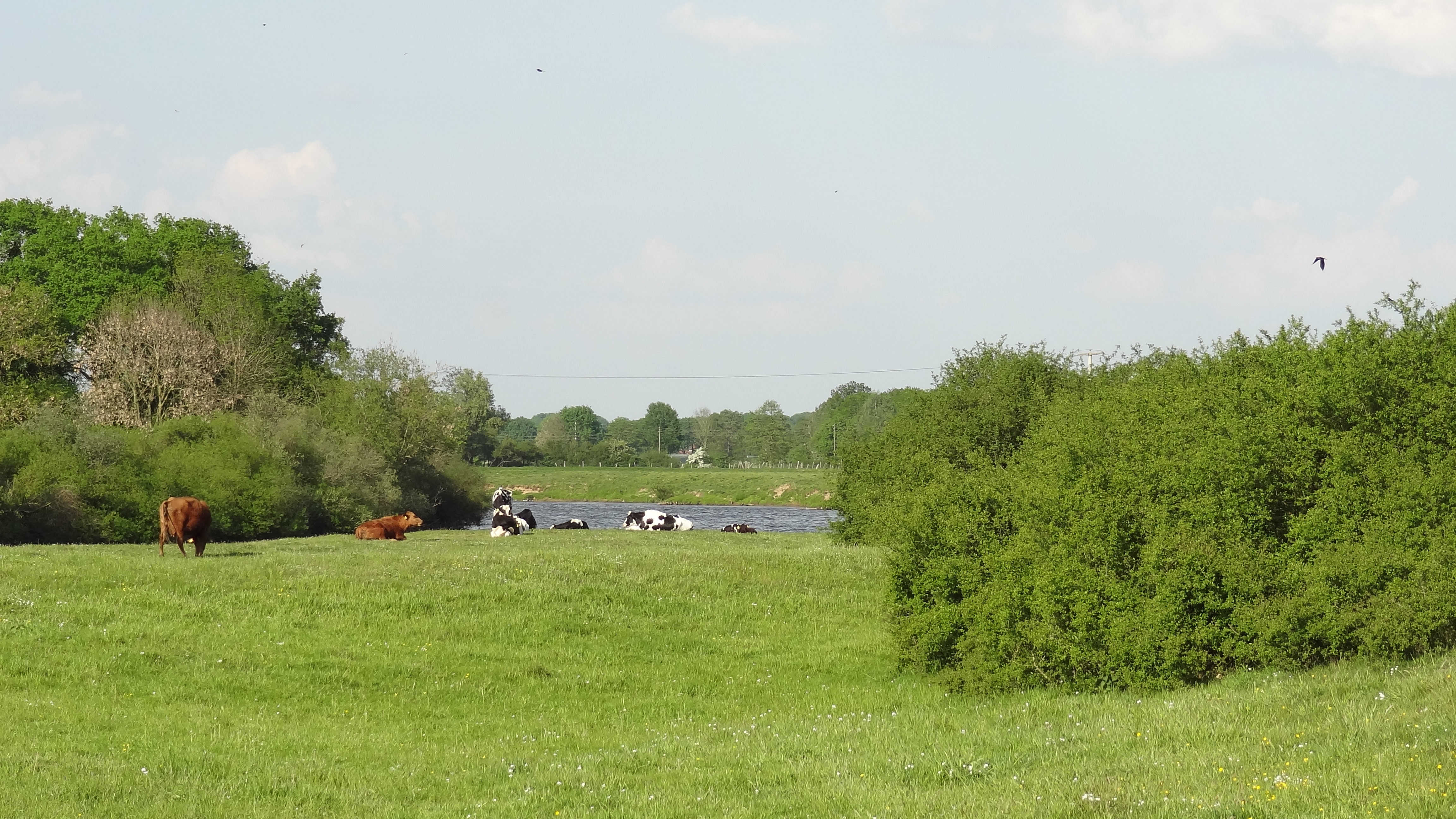 Grasende Kühe am Emsufer im Naturschutzgebiet: Meppener Kuhweide.